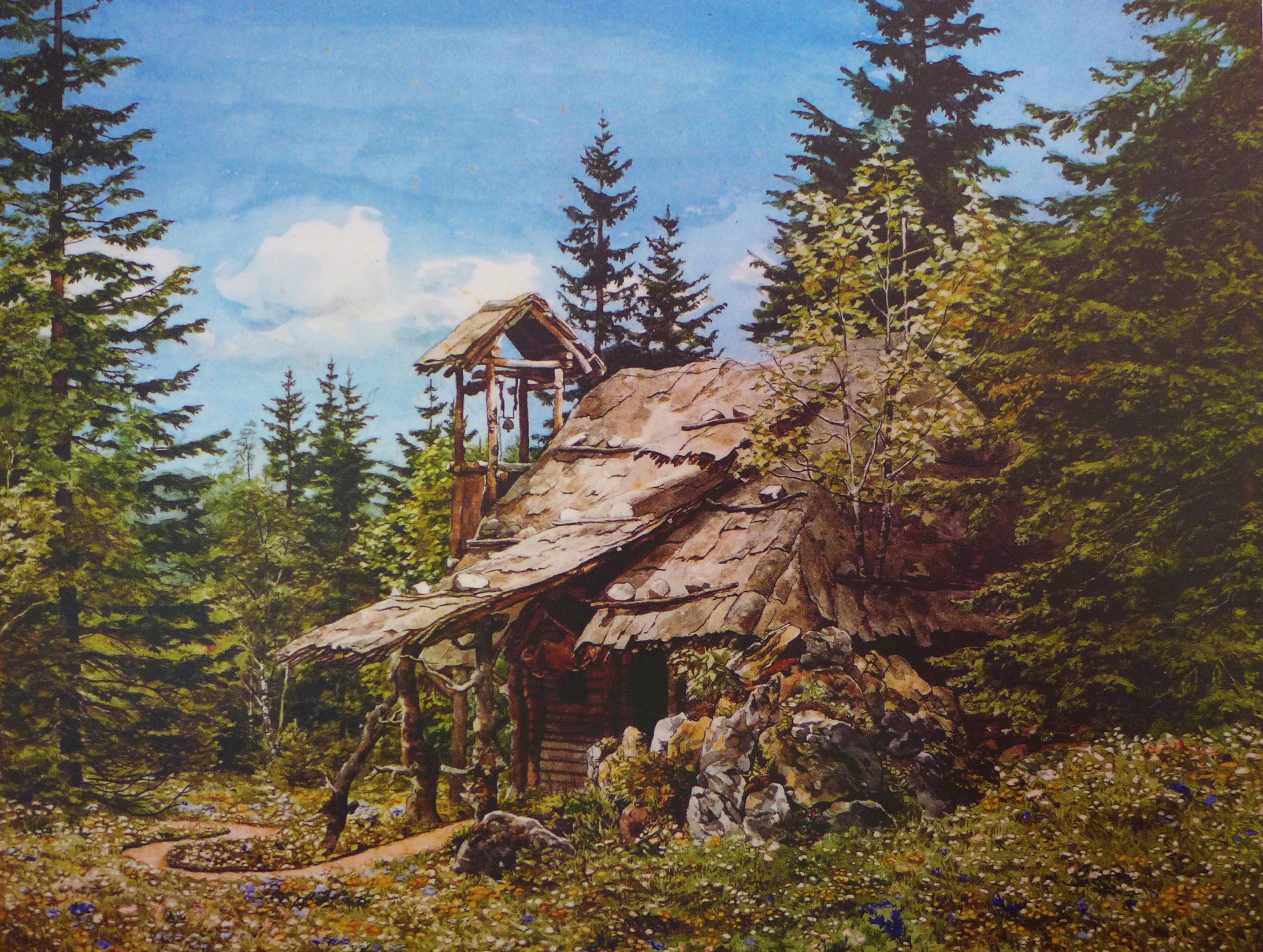 Einsiedelei des Gurnemanz nach dem Bühnenbild des Parsifal, Aquarell von Heinrich Breling, 1882 (Wittelsbacher Ausgleichsfond München)